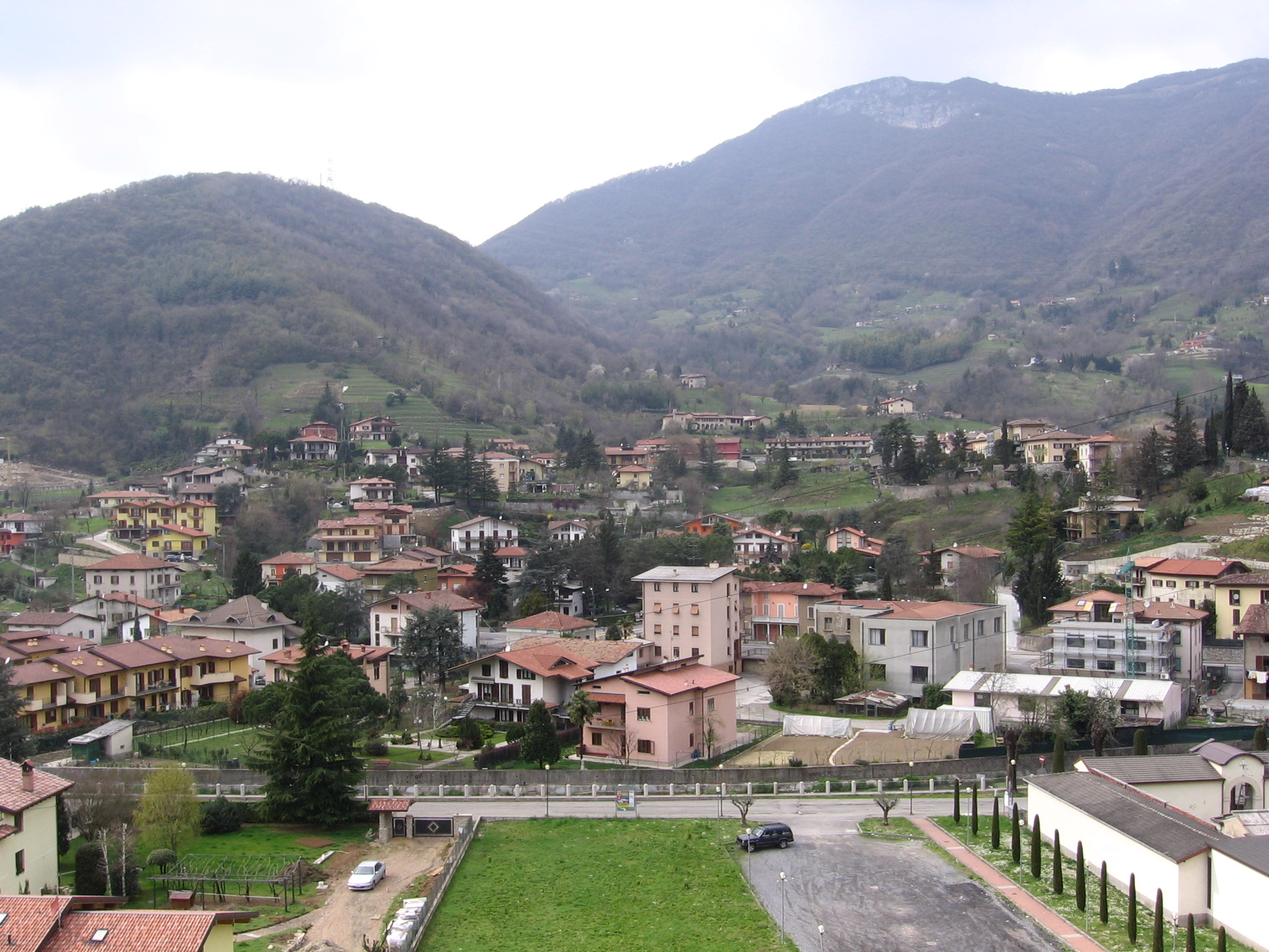 Borgo di Terzo, Bergamo, Italia